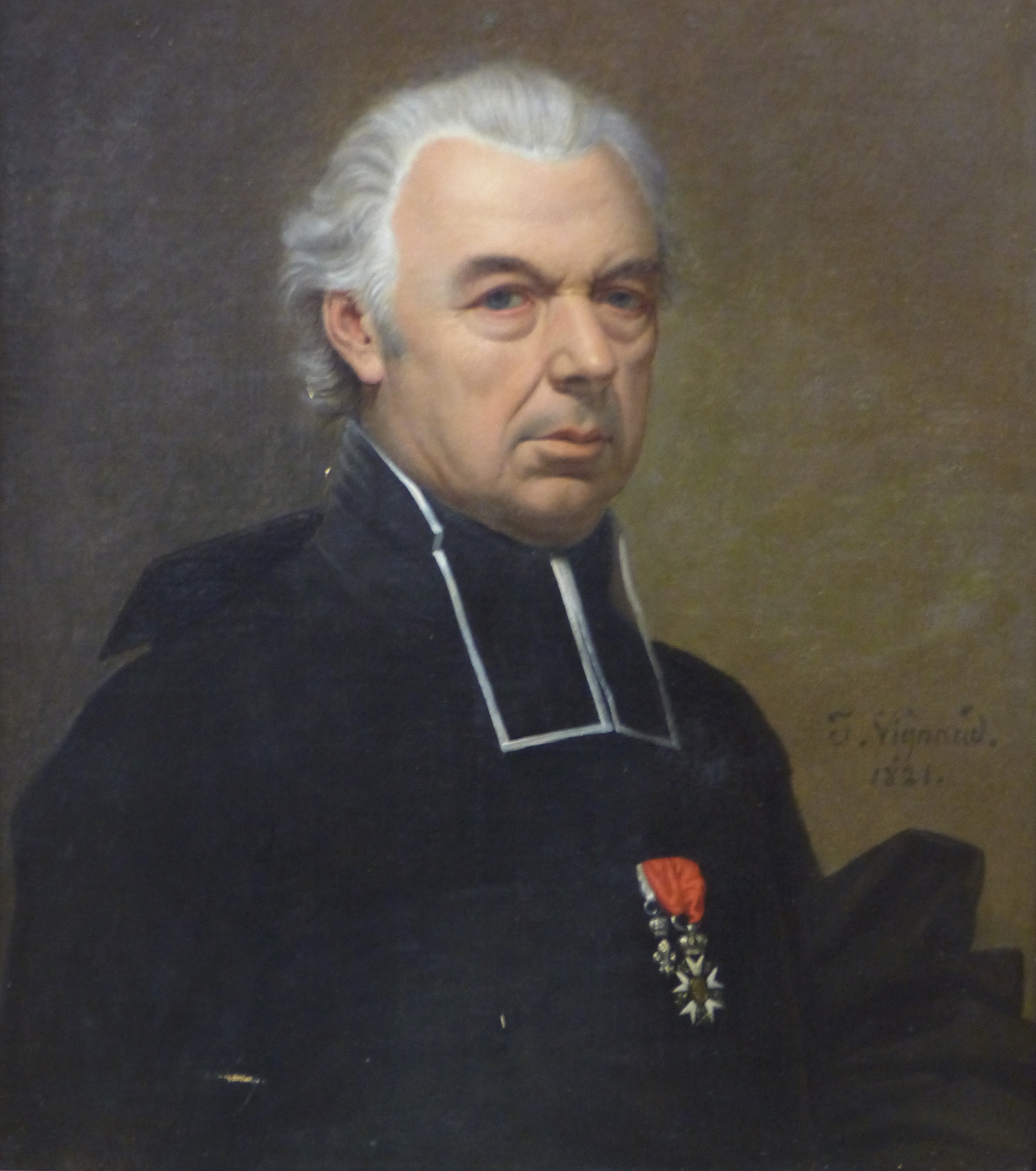 Joseph-François Bonhomme, né le 1er janvier 1759, était entré jeune encore dans la Congrégation des Doctrinaires; la Révolution le surprit remplissant les fonctions de professeur au collège de Tarascon ; rentré d'exil en Italie, il fut nommé le 12 juillet 1801 curé de l'église St Charles à Nîmes et le resta jusqu'à son décès.